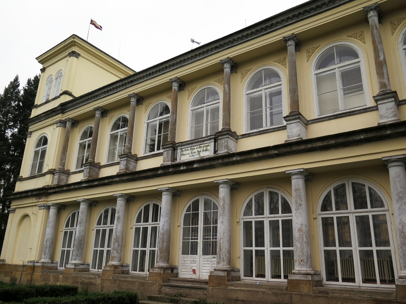 Zámek Kopidlno, Hilmarovo náměstí 1, Kopidlno.